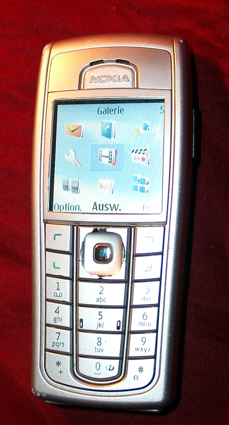 Nokia 6230i silver